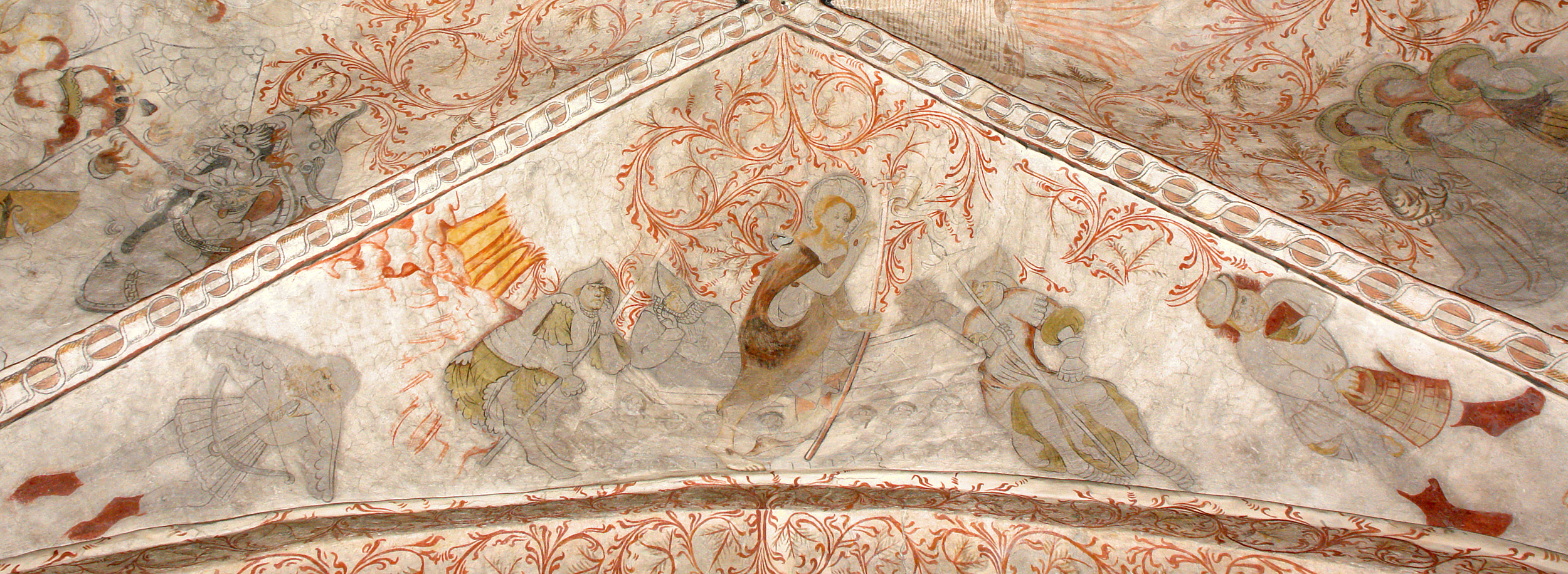 Kirche von Undløse, Dänemark (West-Seeland). Wandmalereien aus der Zeit um 1430–50 vom „Unionsmeister“ oder „Undløse-Meister“ genannten „Meister von Fogdö“. Motiv in dieser Kappe: Auferstehung.